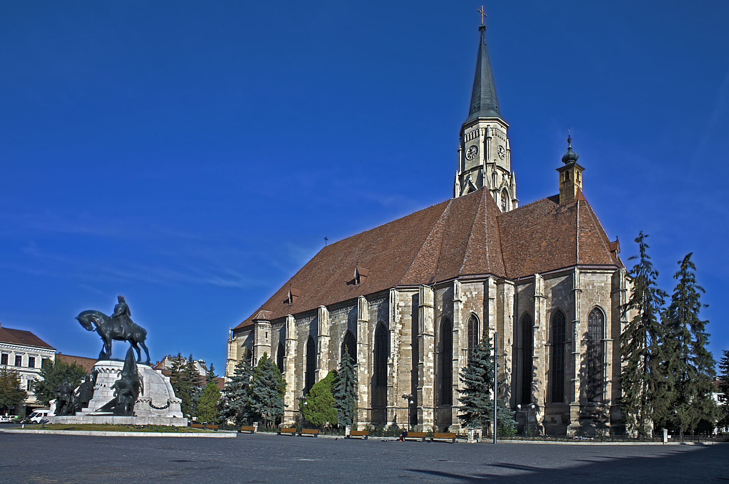 Biserica romano-catolică „Sf. Mihail”